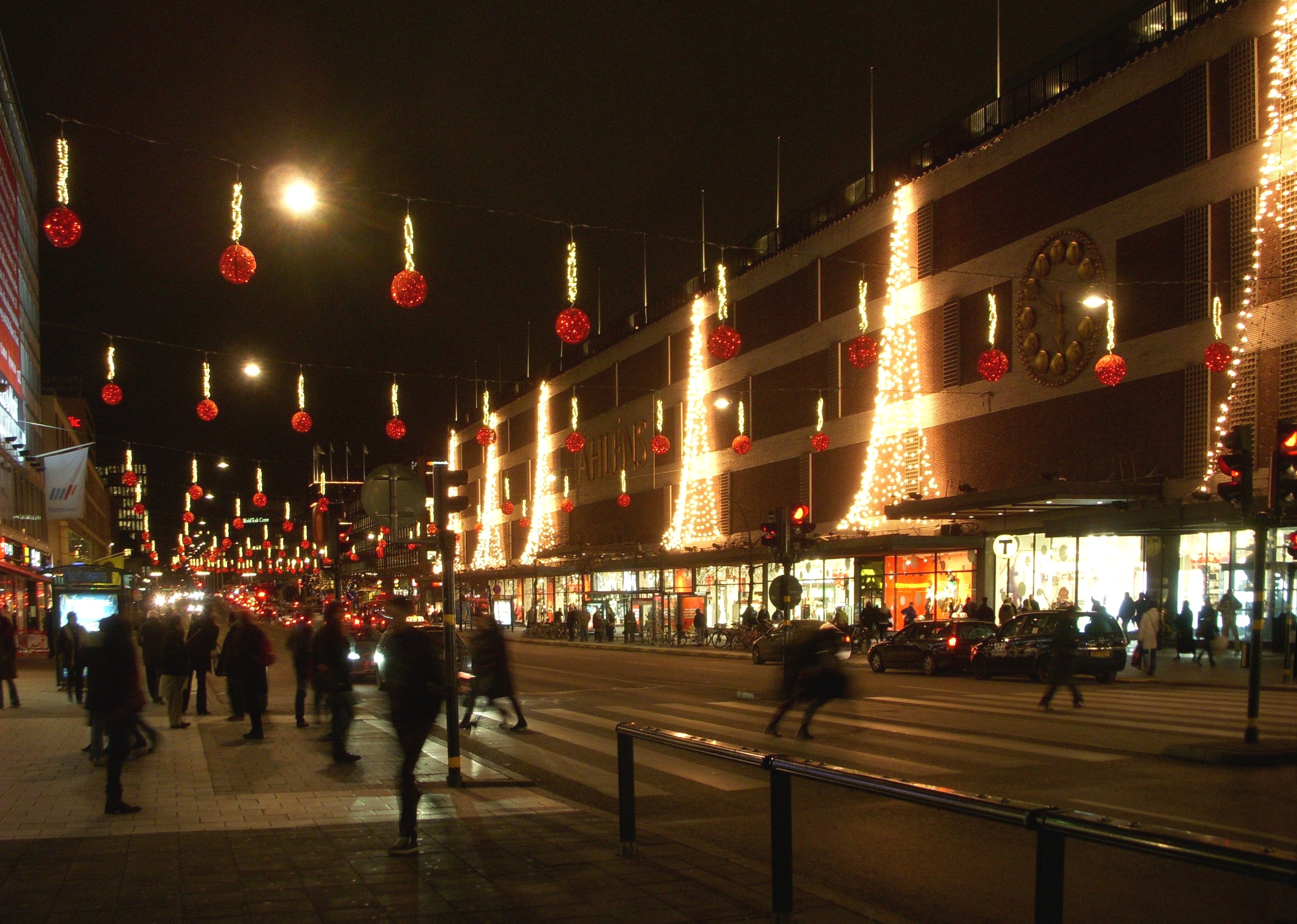 Klarabergsgatan mot väst